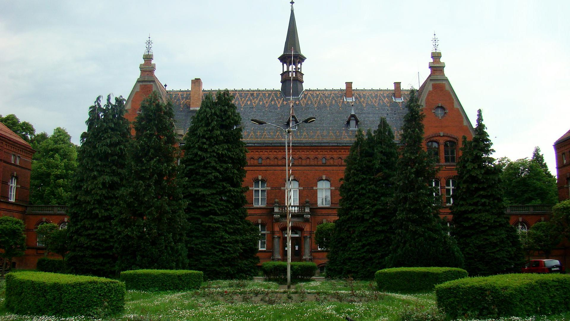 Szpital dla Nerwowo i Psychicznie Chorych im. Stanisława Kryzana przy ul. Skarszewskiej 7.